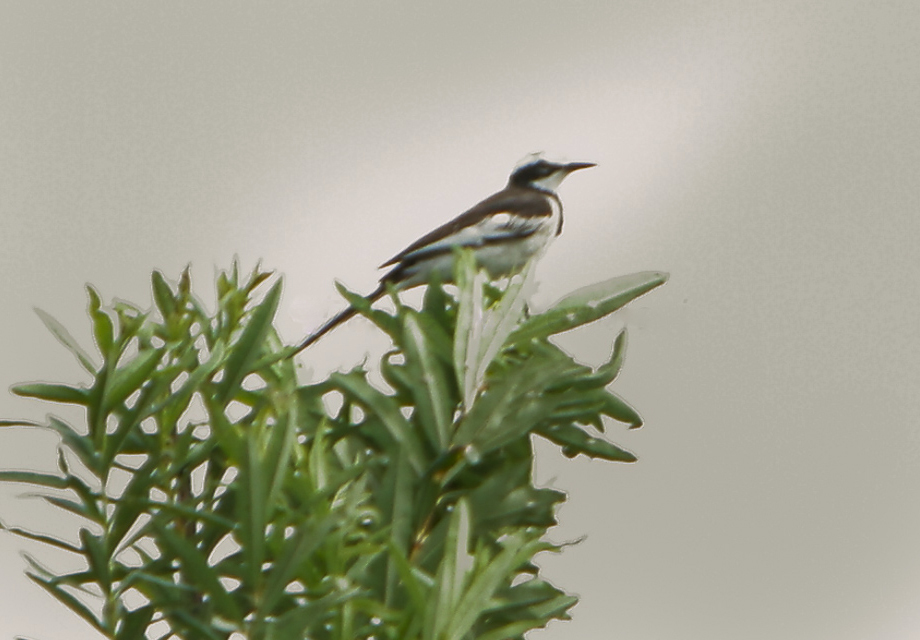 Mekong Wagtail Motacilla samveasnae, Cambodia